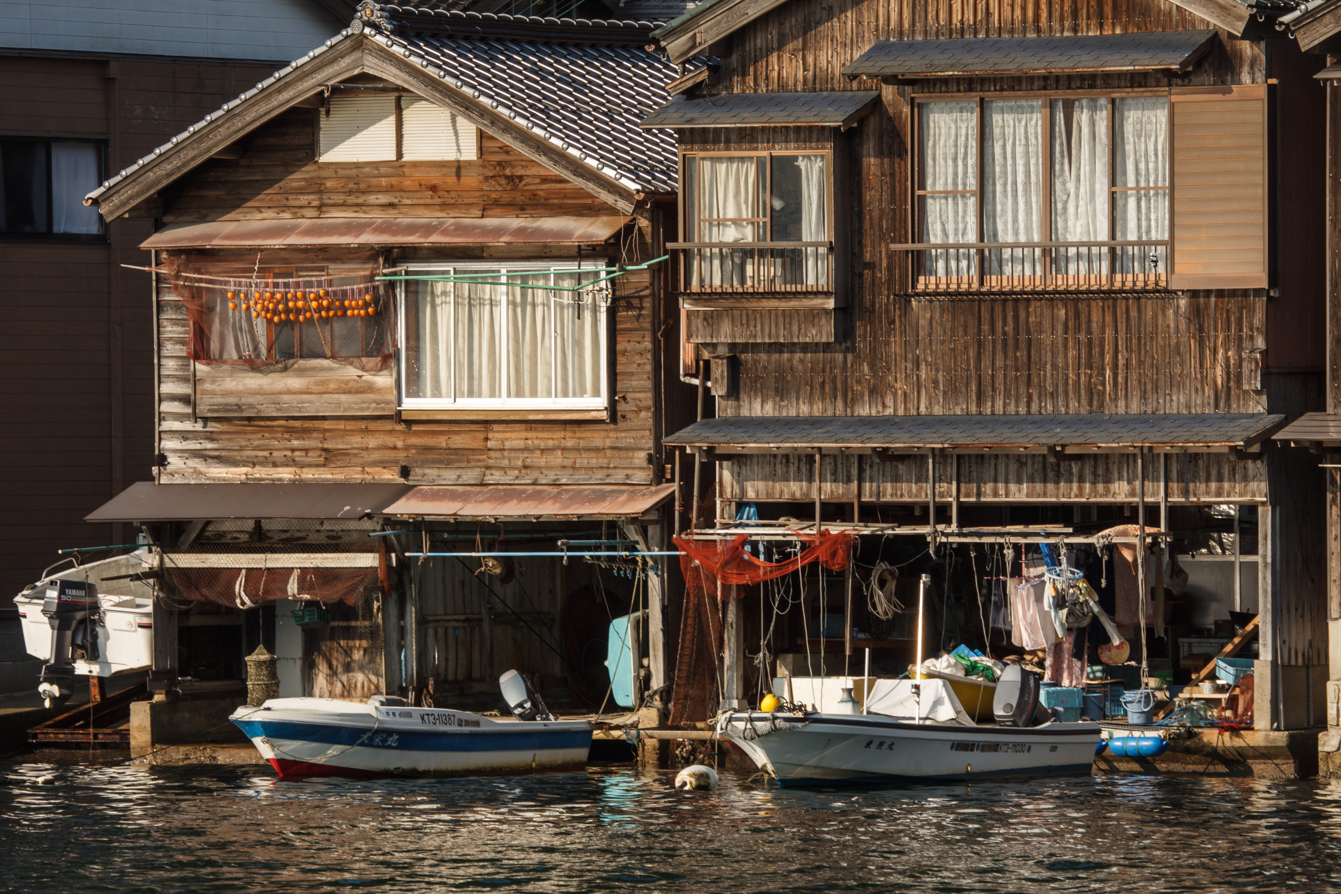 Ine (伊根町)